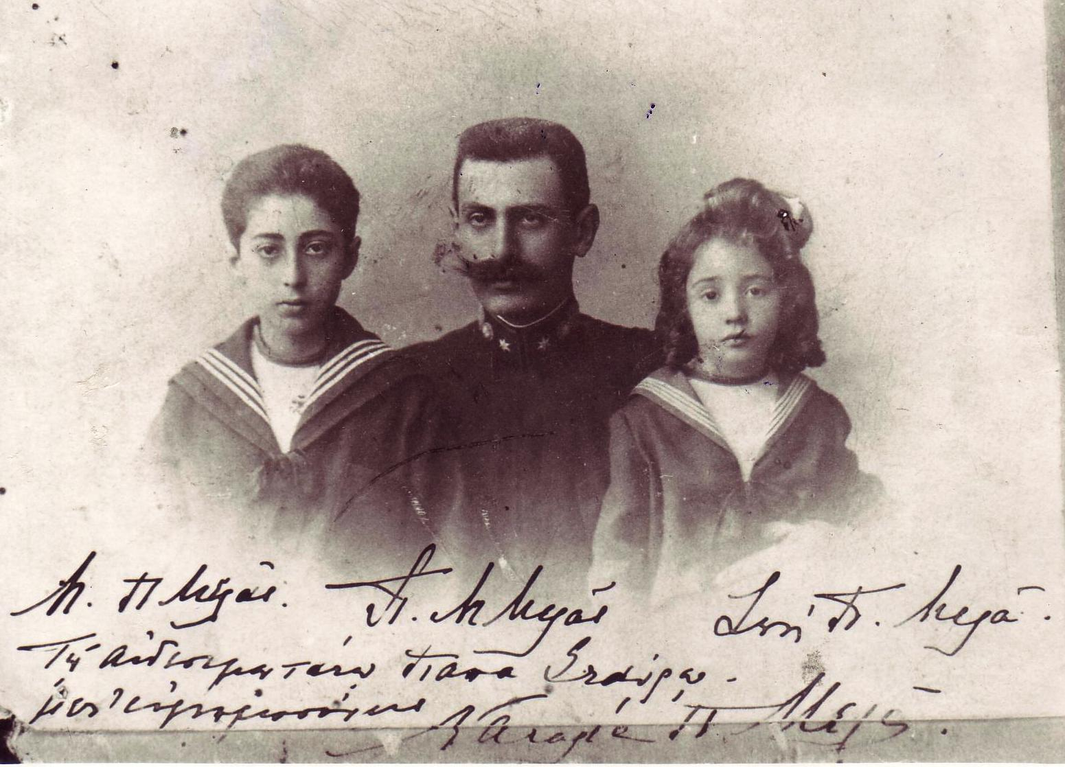 Φωτογραφία του Παύλου Μελά και των παιδιών του αφιερωμένη στον παπα-Σταύρο Τσάμη